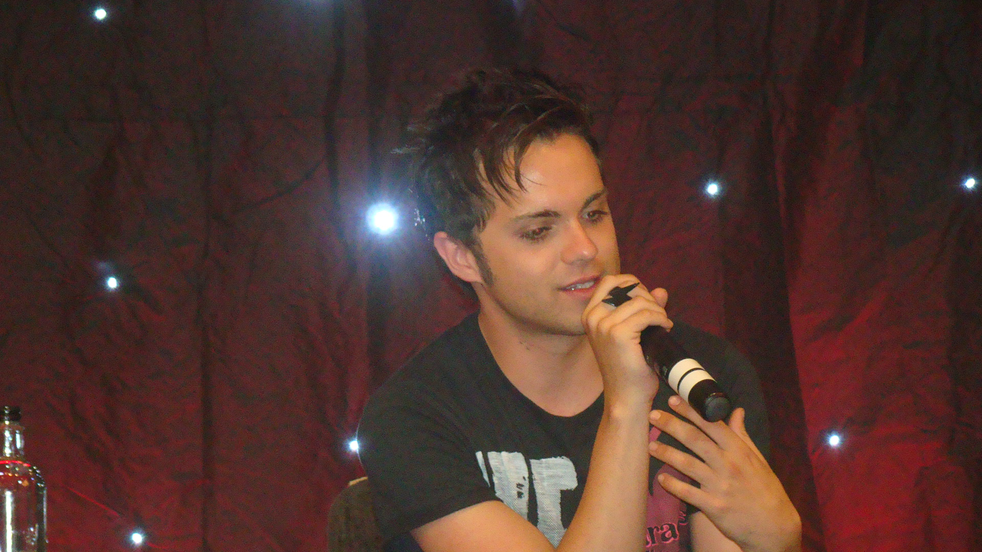 Thomas Dekker